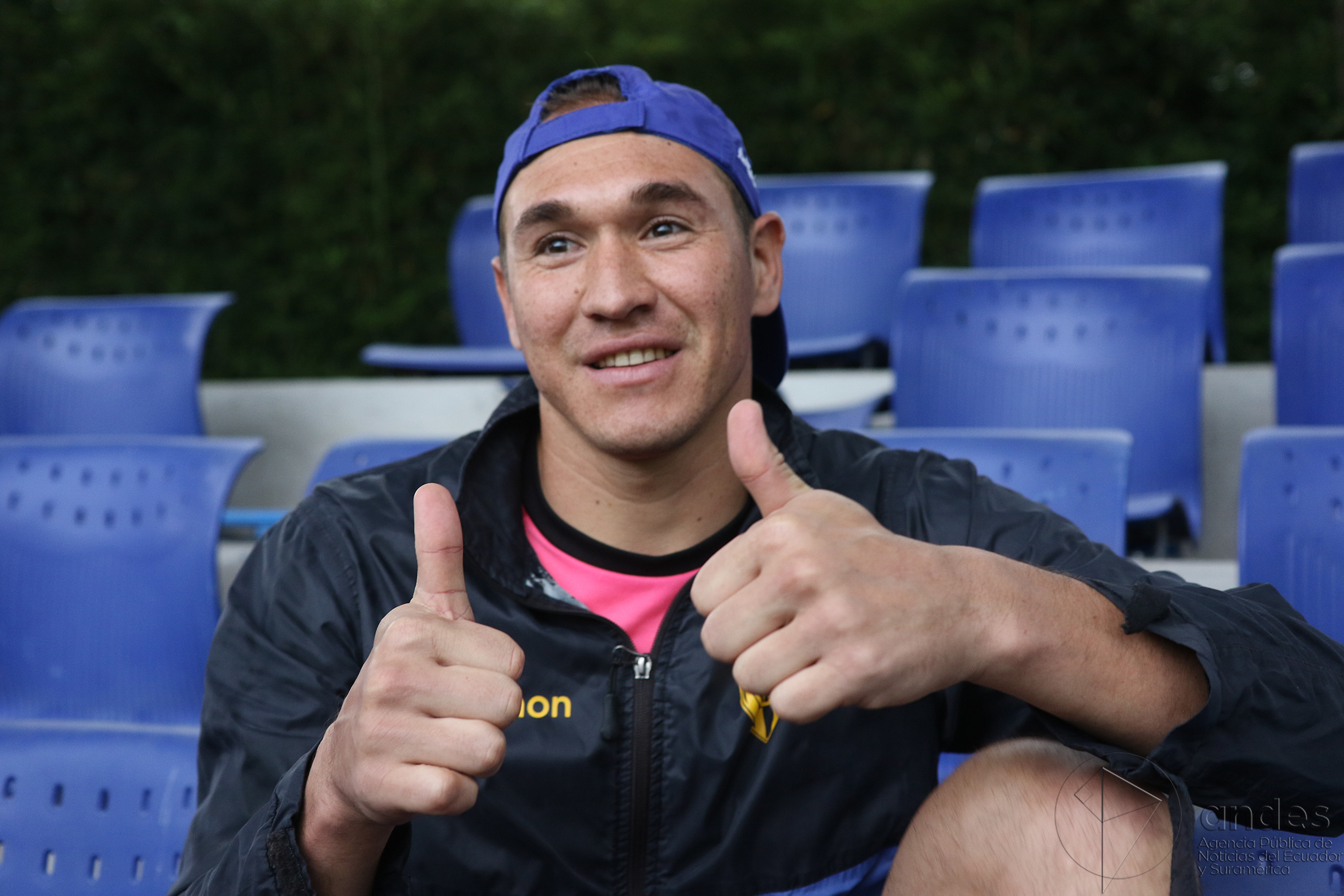 Quito, 06 may (Andes).- Librado Azcona arquero del Independiente manifestó que "todo lo que el equipo esta logrando es gracias al sacrificio de todos sus jugadores". ANDES/Micaela Ayala V.